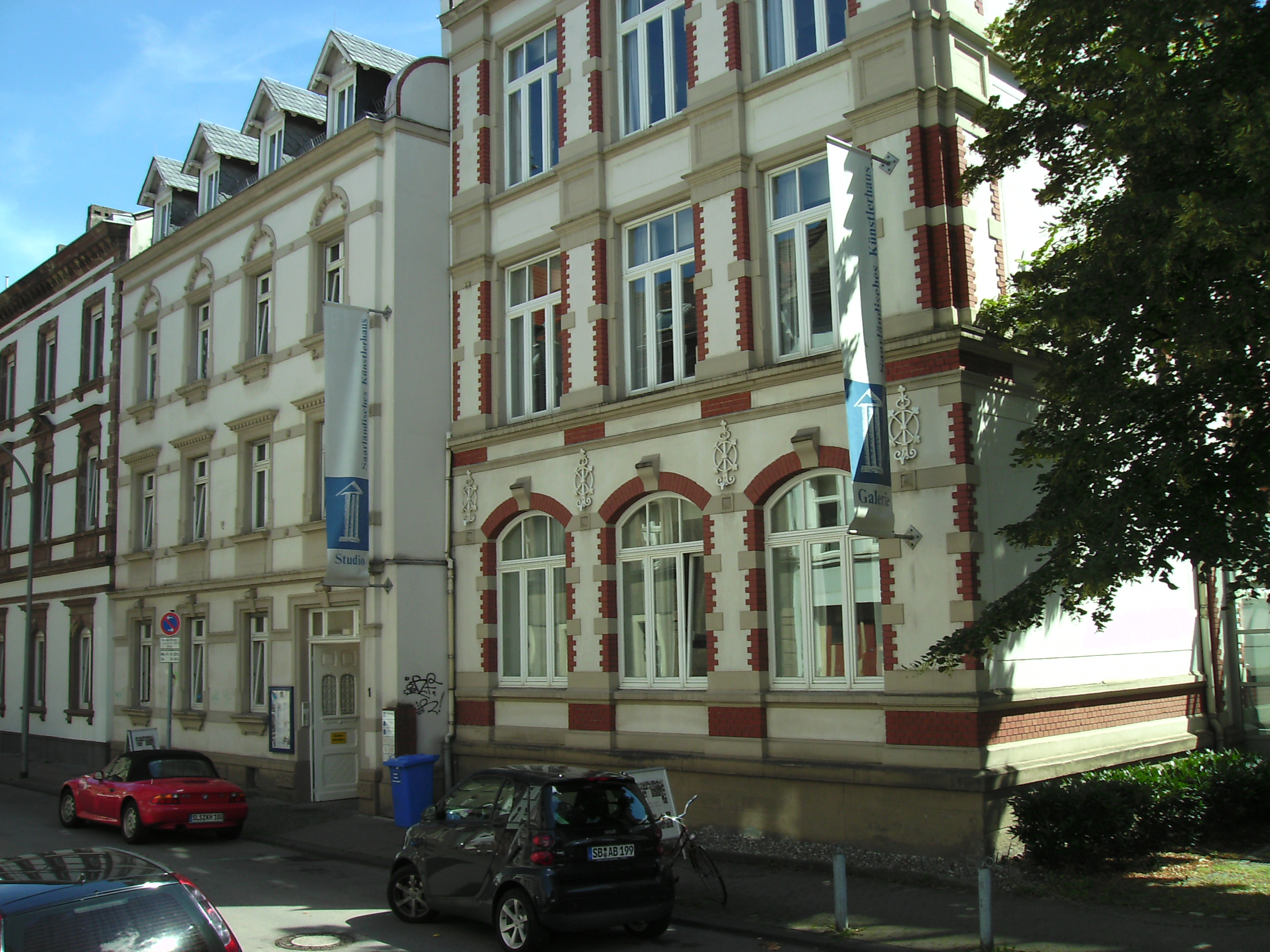 Saarländisches Künstlerhaus: Hausfront